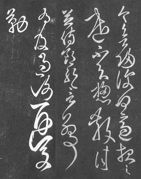 张芝今欲归帖